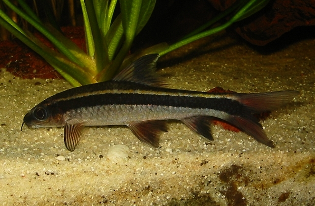 Die echte Schönflossenbarbe (Epalzeorhynchos kalopterus)!